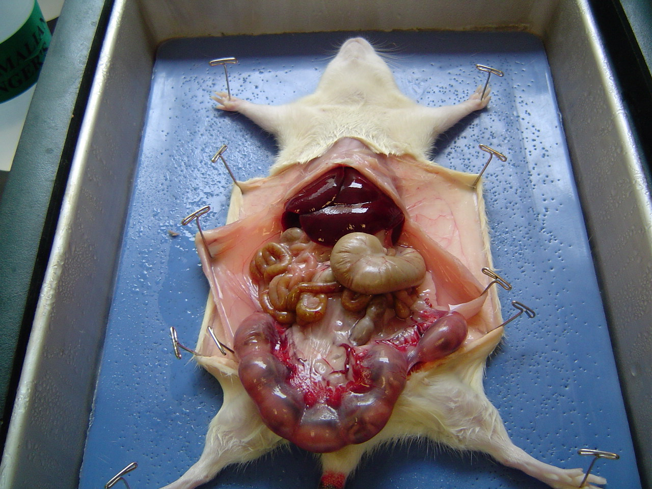 A cut up rat.